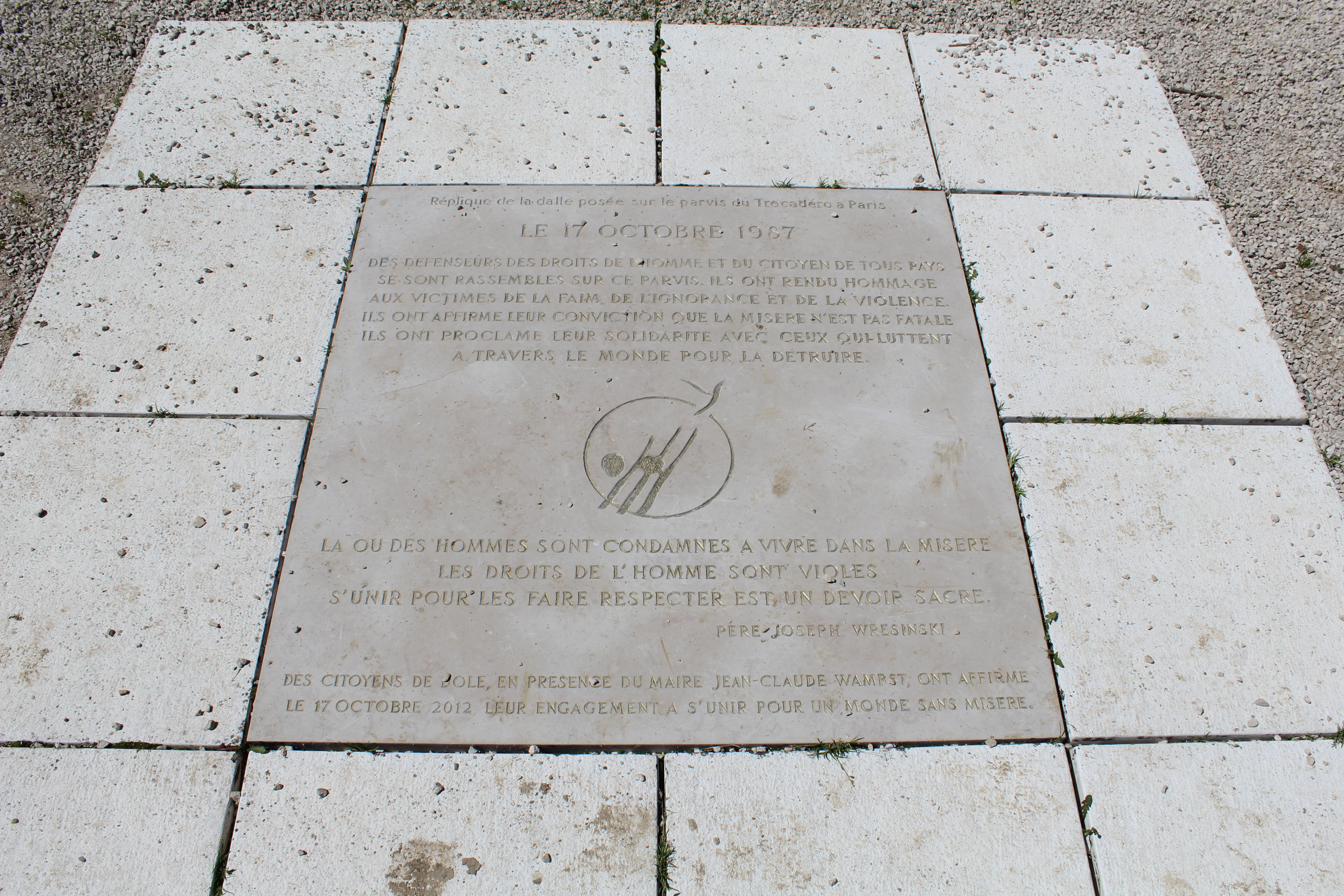 Réplique de la plaque posée sur le parvis du Tocadéro à Paris, elle est située le long du canal des Tanneurs à Dole.